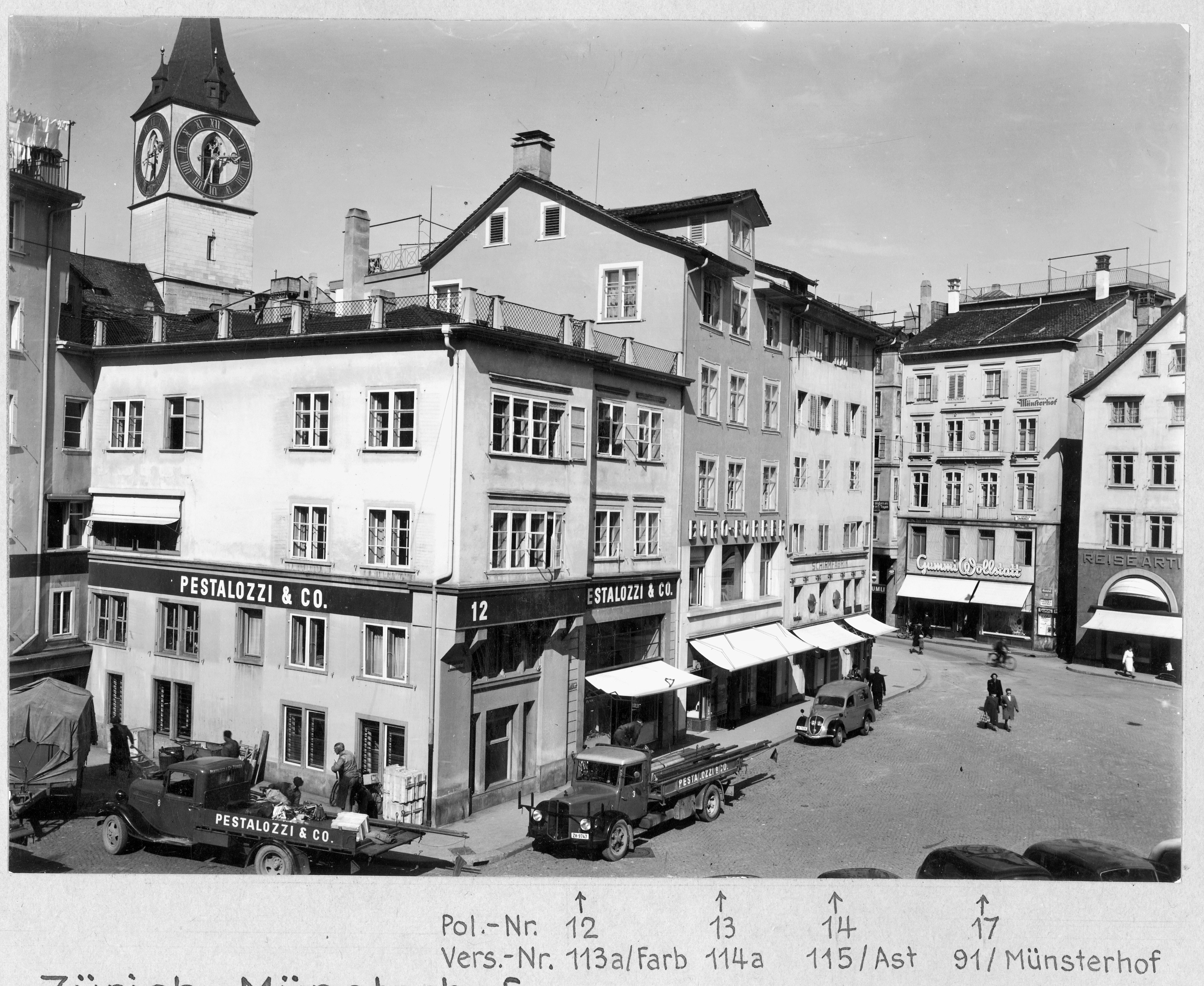 Pestalozzi + Co, Münsterhof 12, Zürich, Schweiz 1947